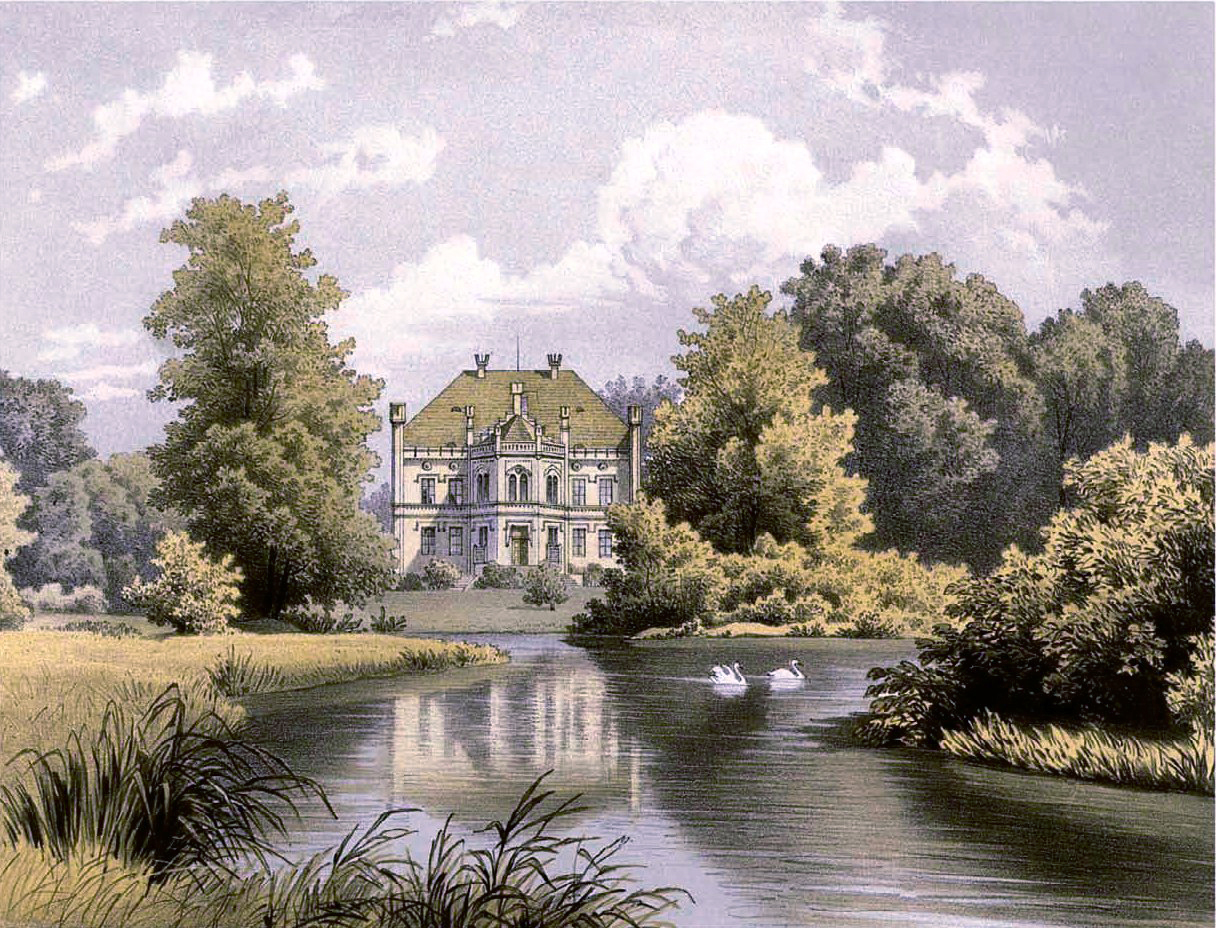 Rittergut Kaltwasser, Kreis Lüben, Provinz Schlesien